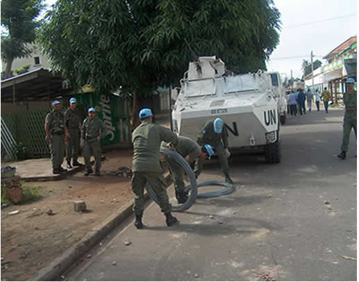 Forces de l'ONUCI sécurisant un périmètre à Bouaké (Côte d'Ivoire)